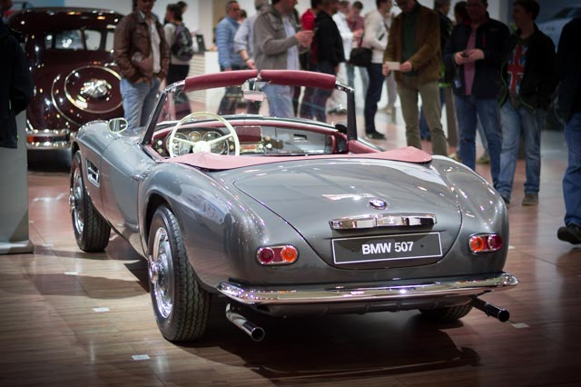 Fotografiert auf der Technoclassica 2016